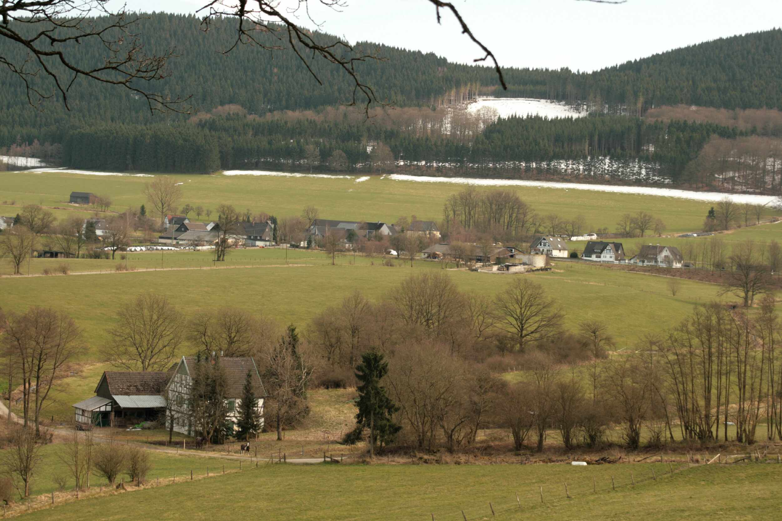 Werntrop mit Mühle Blick von NW